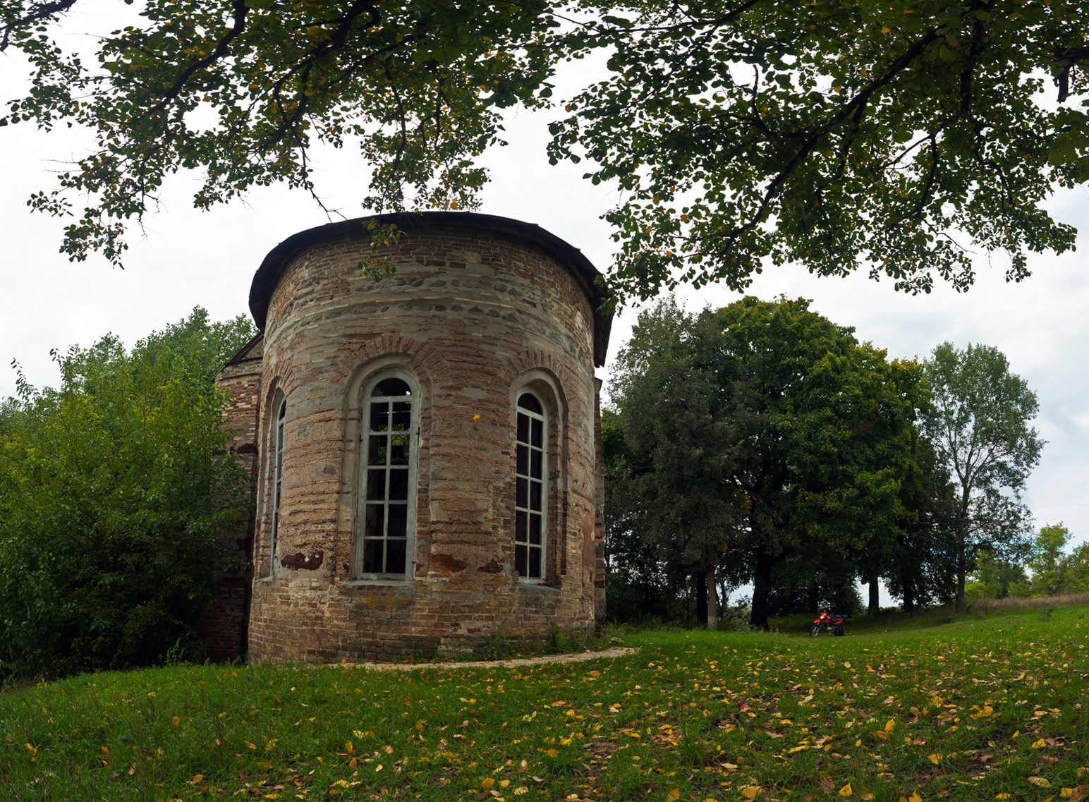 Юр'їва божниця (мур.), Остер, с.Старогородка